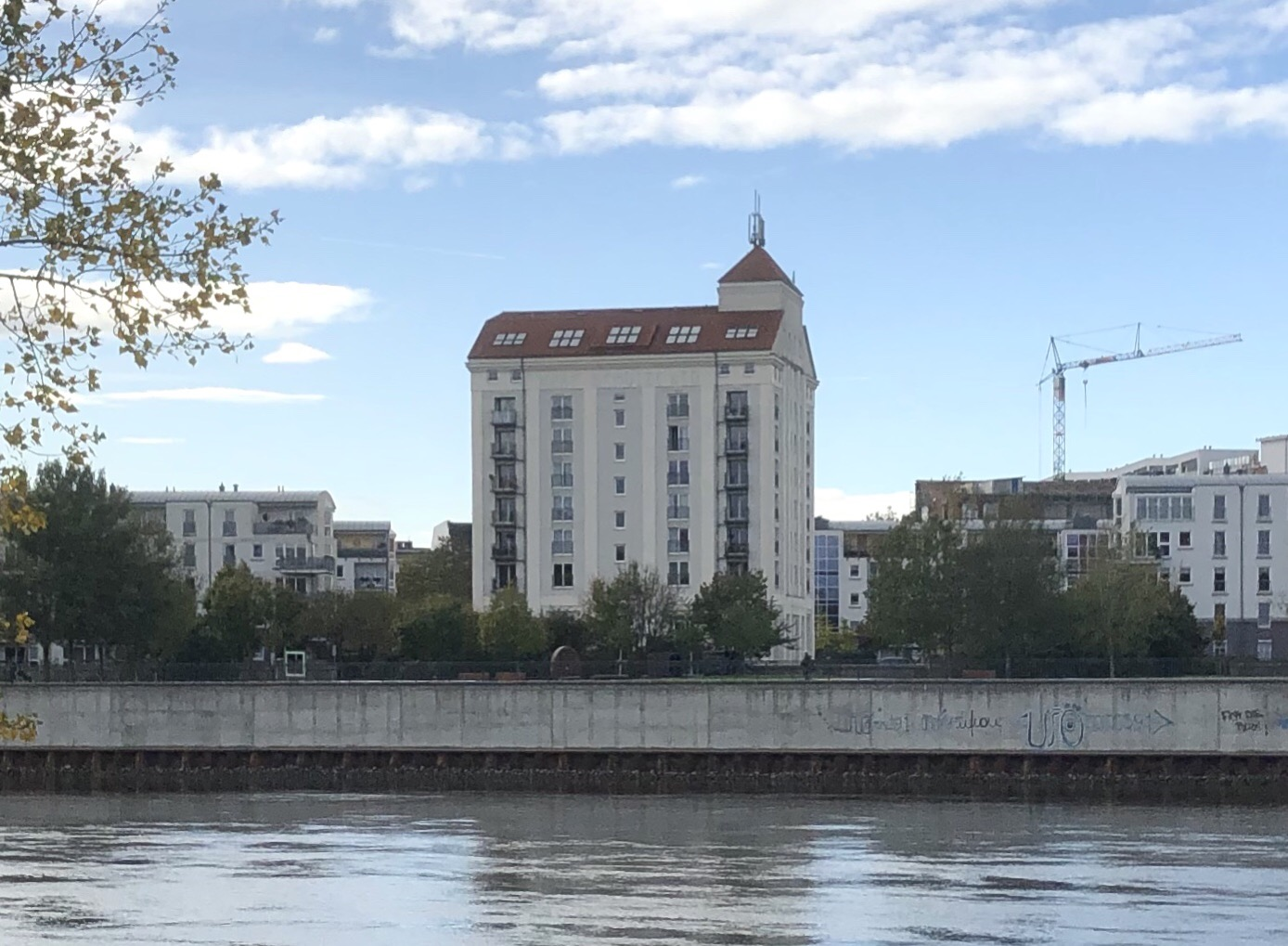 Bleckenburgstraße 11a